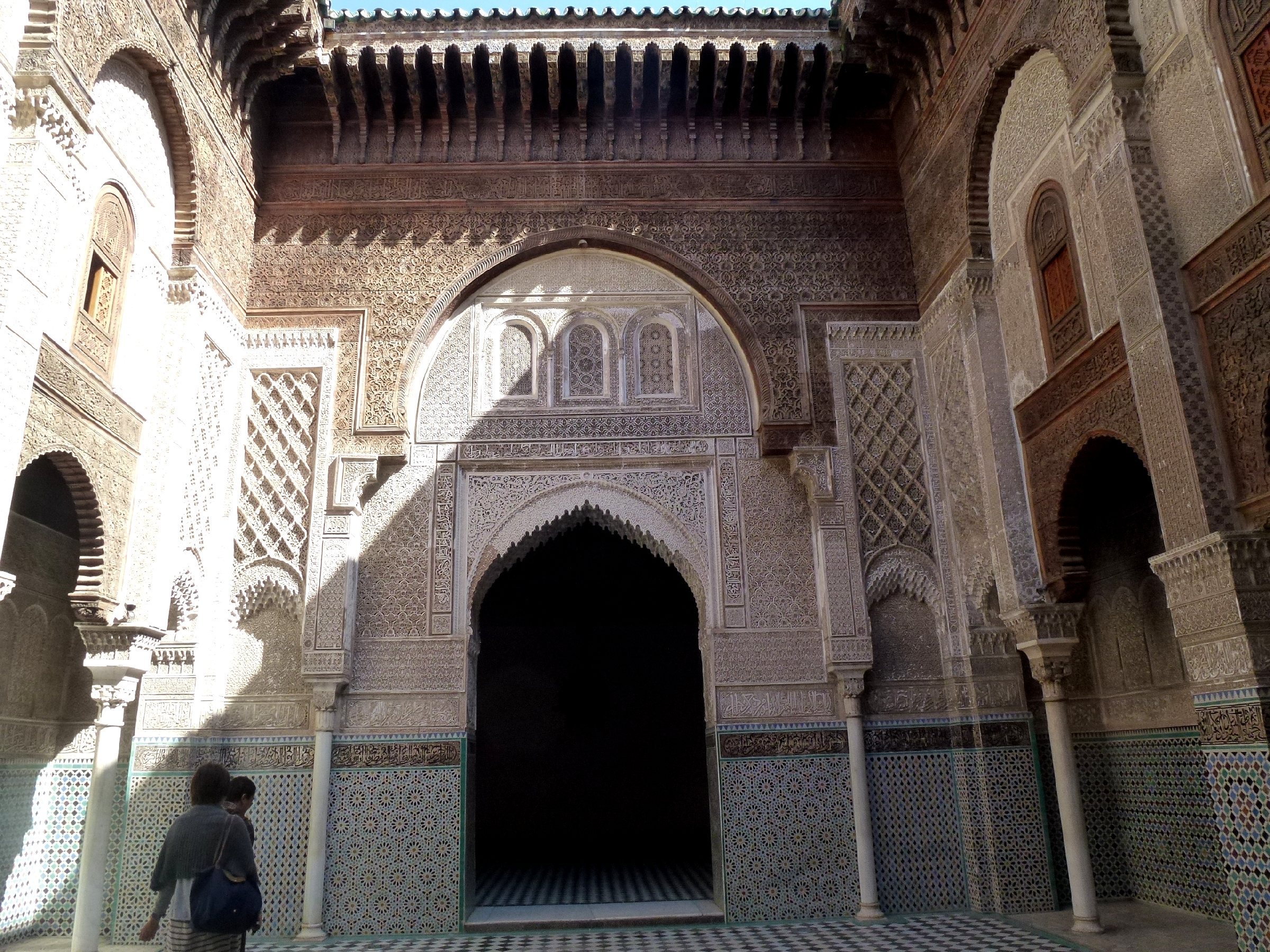 Al Attarine Madrasa Fez el Bali Fez Morocco